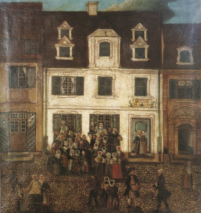 Andrang der Hungrigen im Jahr der Teuerung 1771 vor dem Haus des Bäckermeisters Jean Pierre Puy (Goethestraße 32) in Erlangen